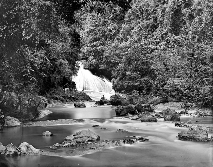 Negatief. Waterval en rivier Maras, Benkulen